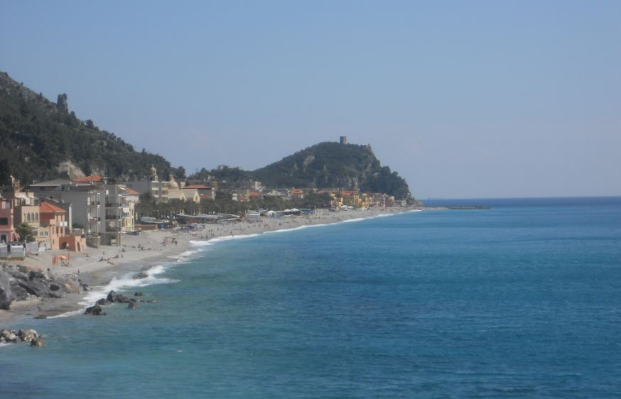 Varigotti.